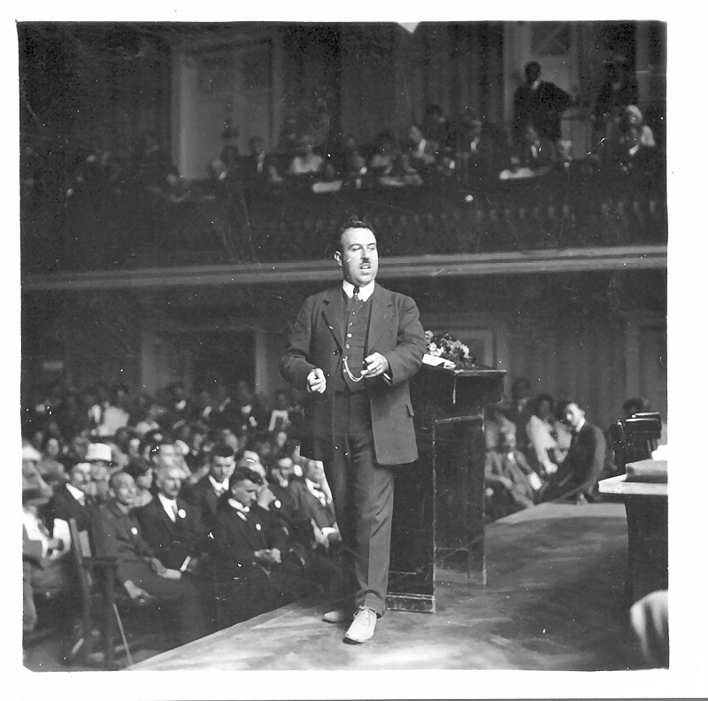 16. Esperanto-Weltkongress, Wien 1924. Rede von Edmond Privat